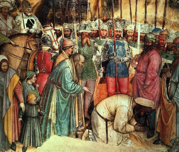 Altichiero da Zevio: Die Enthauptung von St. Georg; Georgskapelle Padua Falls diese Lizenz aus irgendwelchen Gründen doch nicht gelten sollte, gelten darüber hinaus laut der Quelle folgende freien Lizenzen